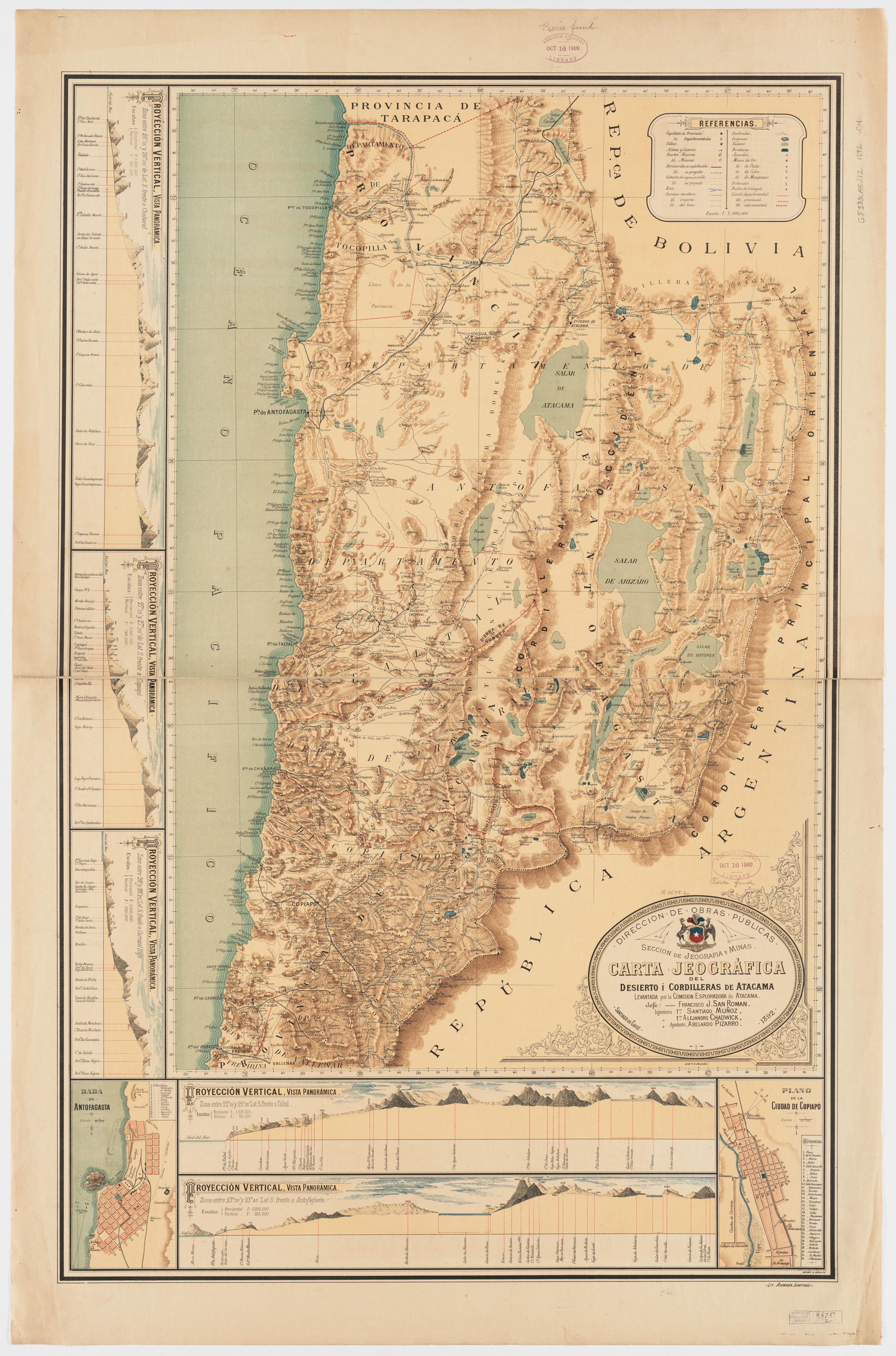 Carta Jeografica del Desierto i Cordilleras de Atacama. Francisco J. San Román, Dirección de Obras Públicas, Chile. 1892. Nota: El mapa mostrado por tiene una resolución aún mejor que la de 2.55 MB.